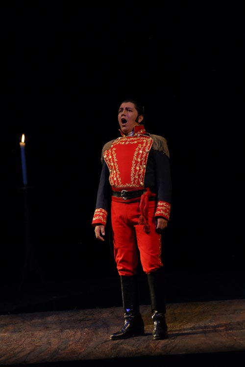 Marlon Valverde es Simón Bolivar en la ópera Manuela y Bolivar de D. Luzuriaga, Mayo de 2009 Teatro Sucre